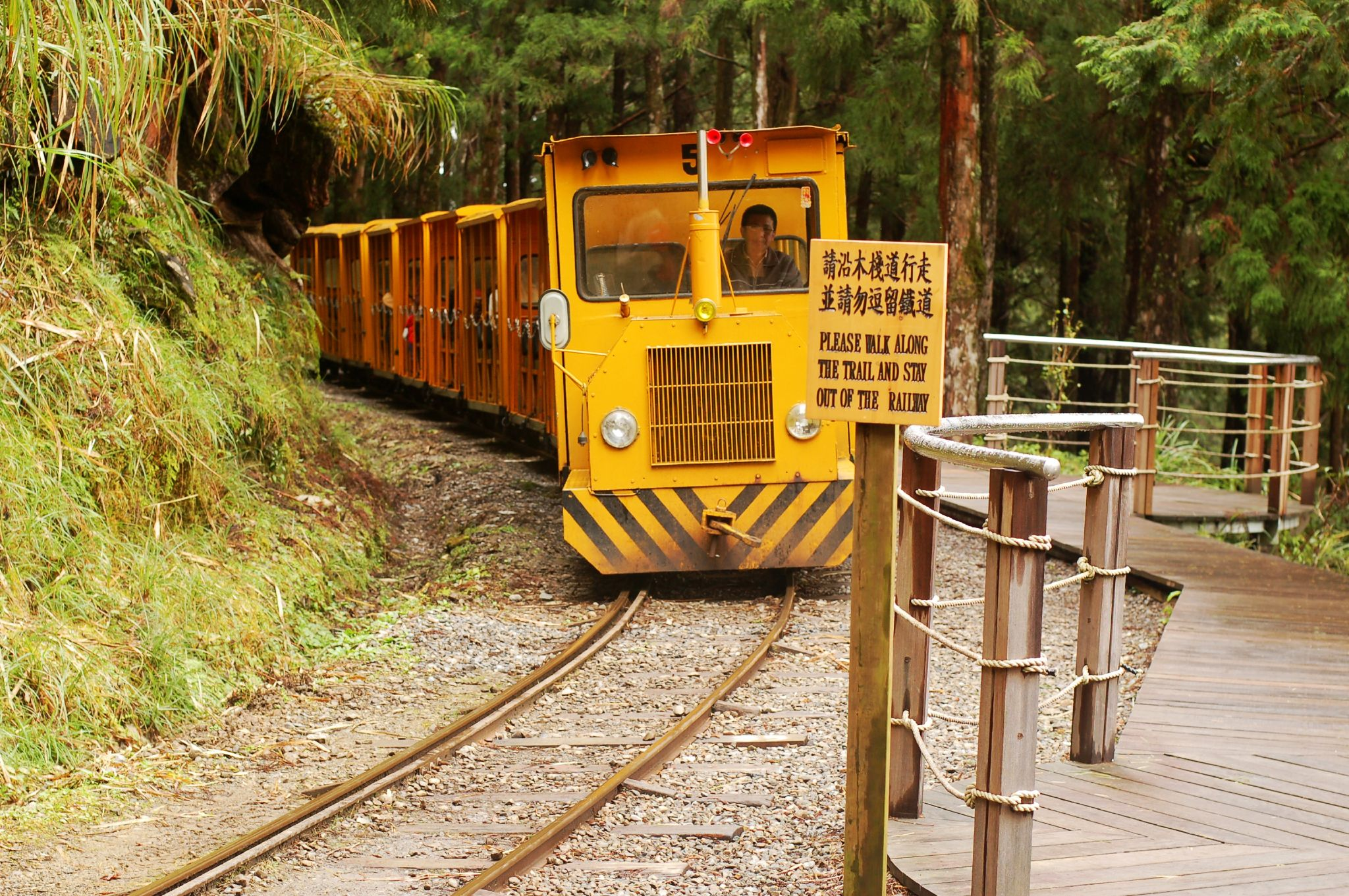 Taiping Mountain Forest Railway Bong Bong Train 太平山森林鐵路 蹦蹦車